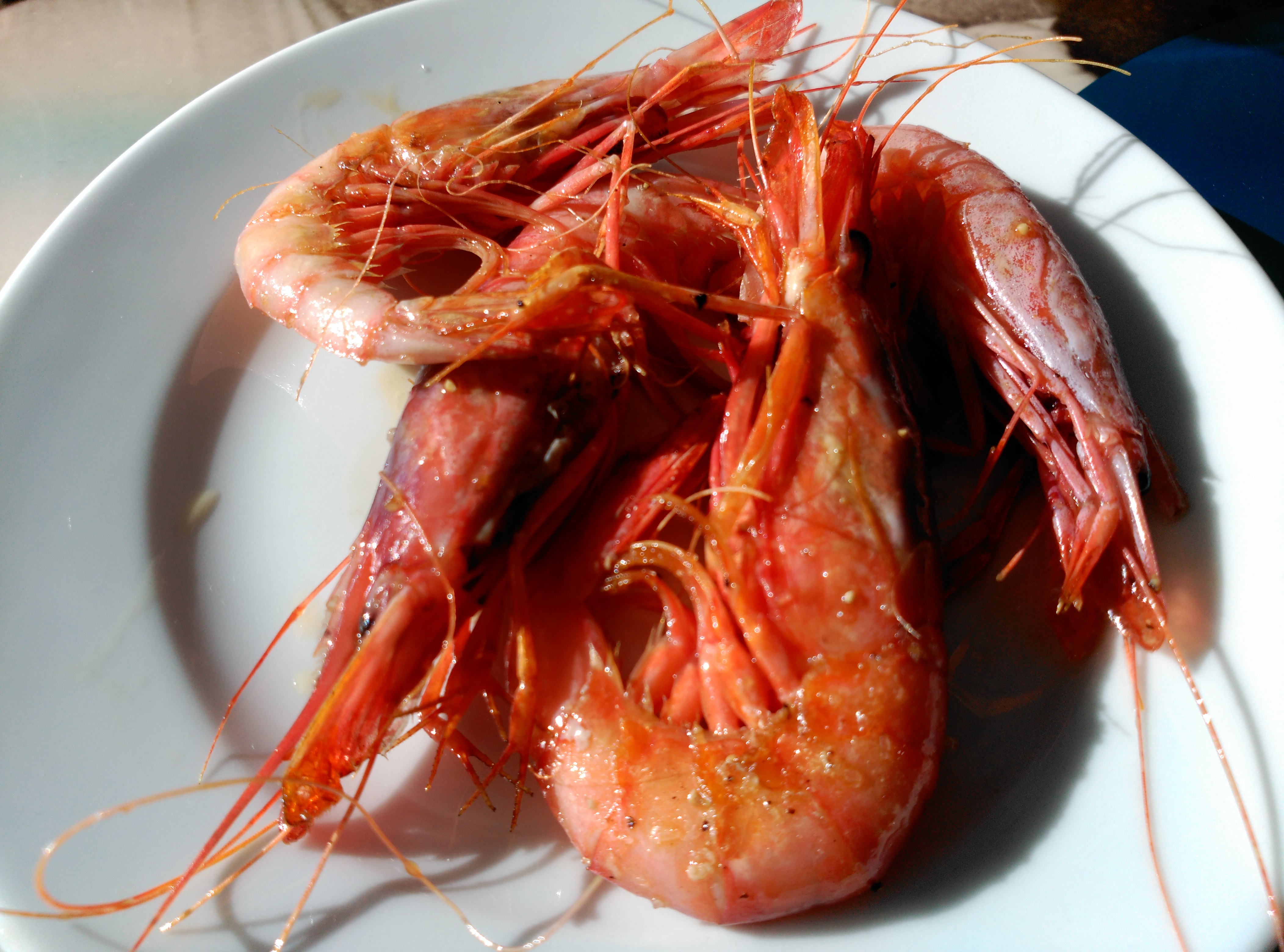 Gamba de Palamós cuita a la planxa a l'Espai del Peix de Palamós.